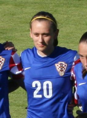 Valentina Stipančević